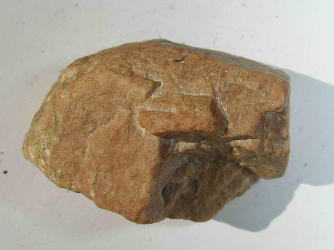 Ortosa